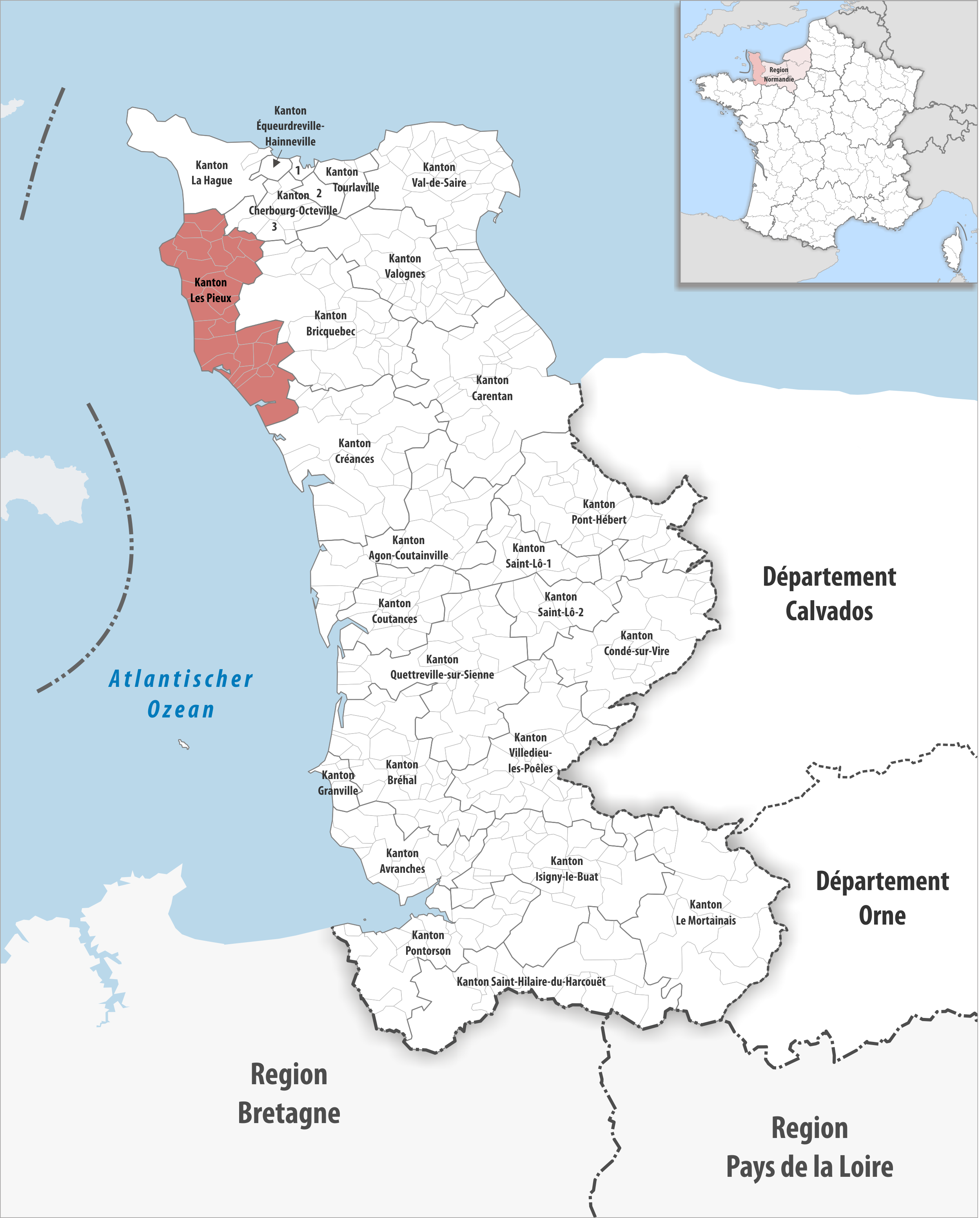 Lage des Kantons Les Pieux